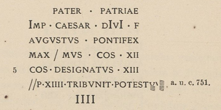 Image from the book Corpus Inscriptionum Latinarum [12]. Inscriptiones Galliae Narbonensis Latinae, éd. par Otto Hirschfeld, Berlin, Berlin-Brandenburgische Akademie der Wissenschaften, 1888, inscription 5482